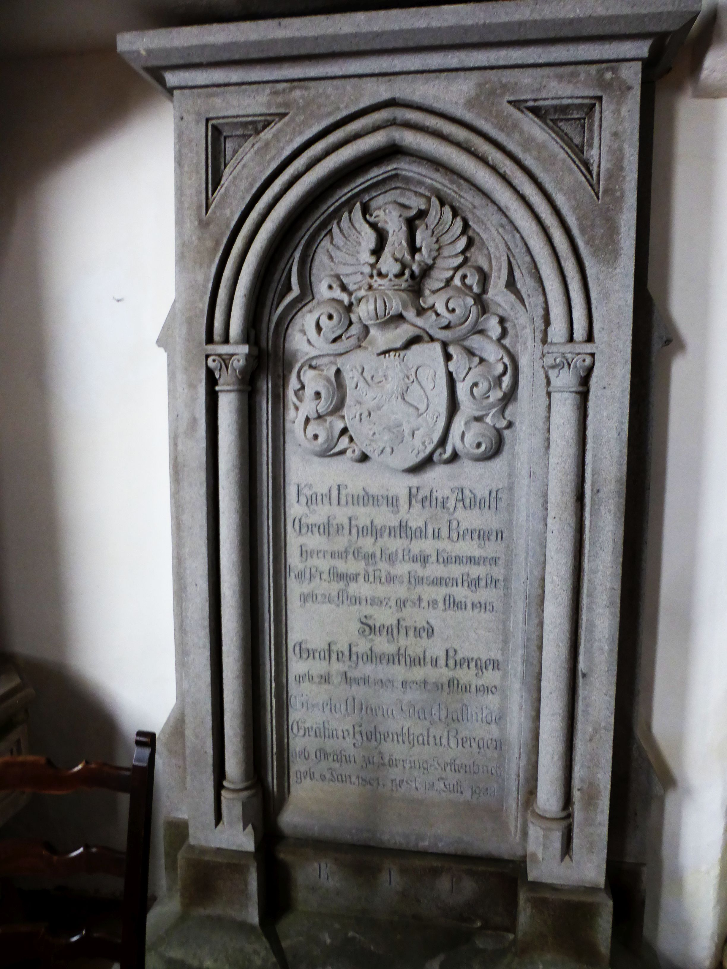 Epitaph der Grafen von Hohenthal auf Schloss Egg